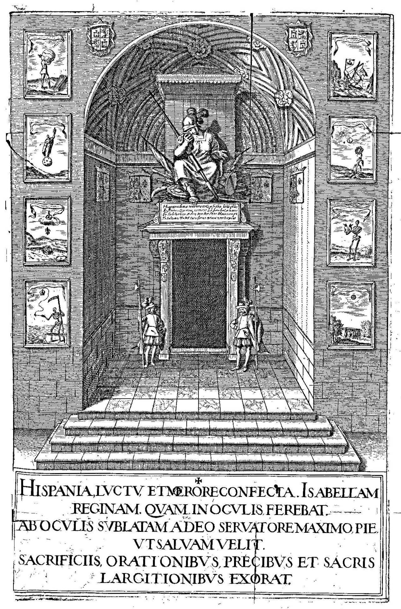 Ornato de la fachada de la iglesia de San Jerónimo el Real de Madrid para las honras fúnebres por la muerte de Isabel de Borbón: Pompa Fvneral Honras y Exequias en la muerte de la muy alta y Católica Señora Doña Isabel de Borbon, Reyna de las Españas y del Nuevo Mundo que se celebraron en el... Convento de S. Geronimo de la villa de Madrid mandadas publicar por el conde de Castrillo, en Madrid, por Diego Díaz de la Carrera, 1645. Biblioteca Nacional de España.